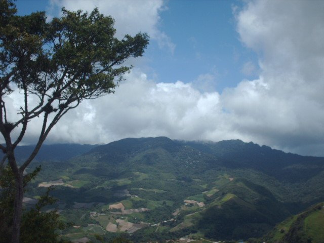 Paisaje